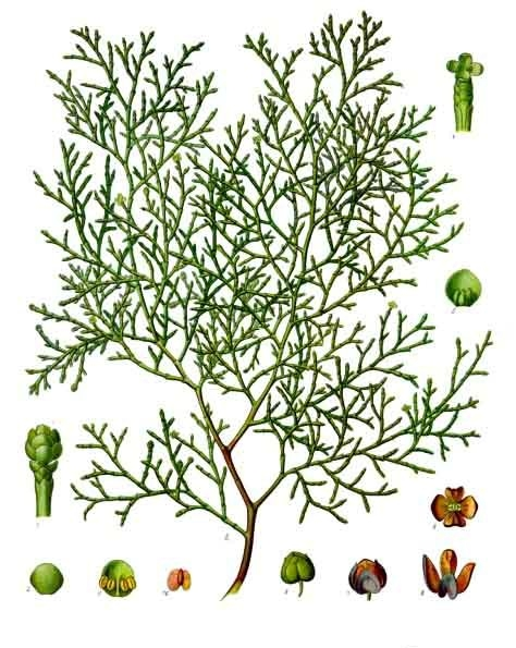 Sandarakbaum. A Zweig in natürl. Grösse; 1 männliche Blüthe, vergrössert; 2, 3 Staubblätter von verschiedenen Seiten, desgl.; 4 weibliche Blüthe, desgl.; 5 Fruchtblatt mit 3 Samenknospen, desgl.; 6 Fruchtzapfen, geschlossen, desgl.; 7 derselbe geöffnet, desgl.; 8, 9 vollständig geöffneter Zapfen von oben und von der Seite, desgl.; 10 Same, desgl.